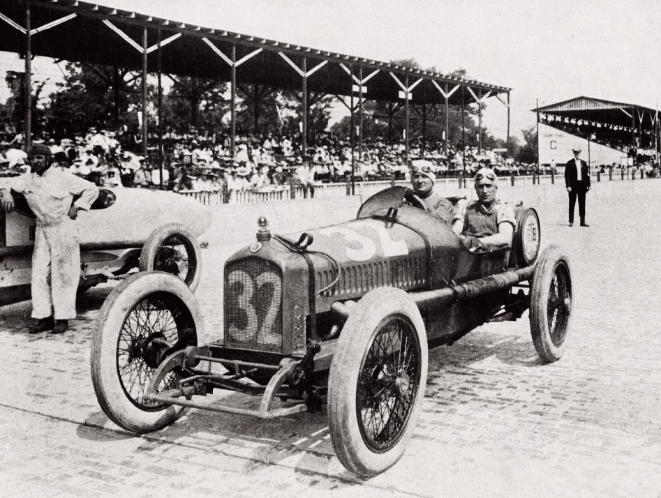 Albert Guyot à Indianapolis en 1919 sur Ballot (4e) - Le Sport Universel Illustré du 4 mars 1921, p.525